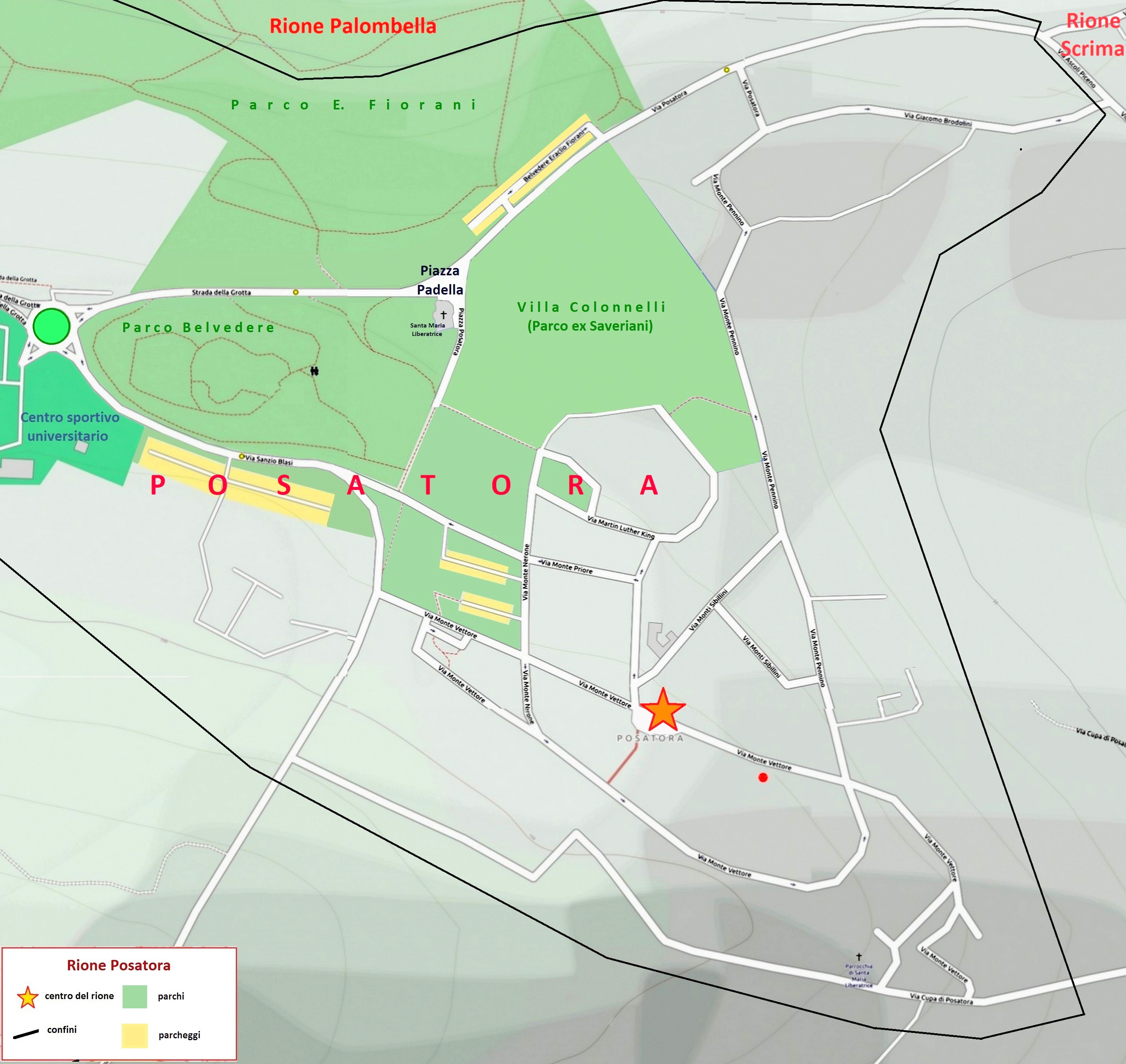 Mappa del Rione Posatora di Ancona, con i confini, le vie, le piazze e i parchi.